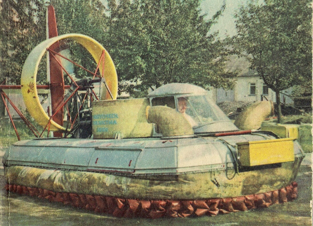 Model funkcjonalny poduszkowca rolniczego Ursynów M-6. Inst. Mechanizacji Rolnictwa SGGW Warszawa.